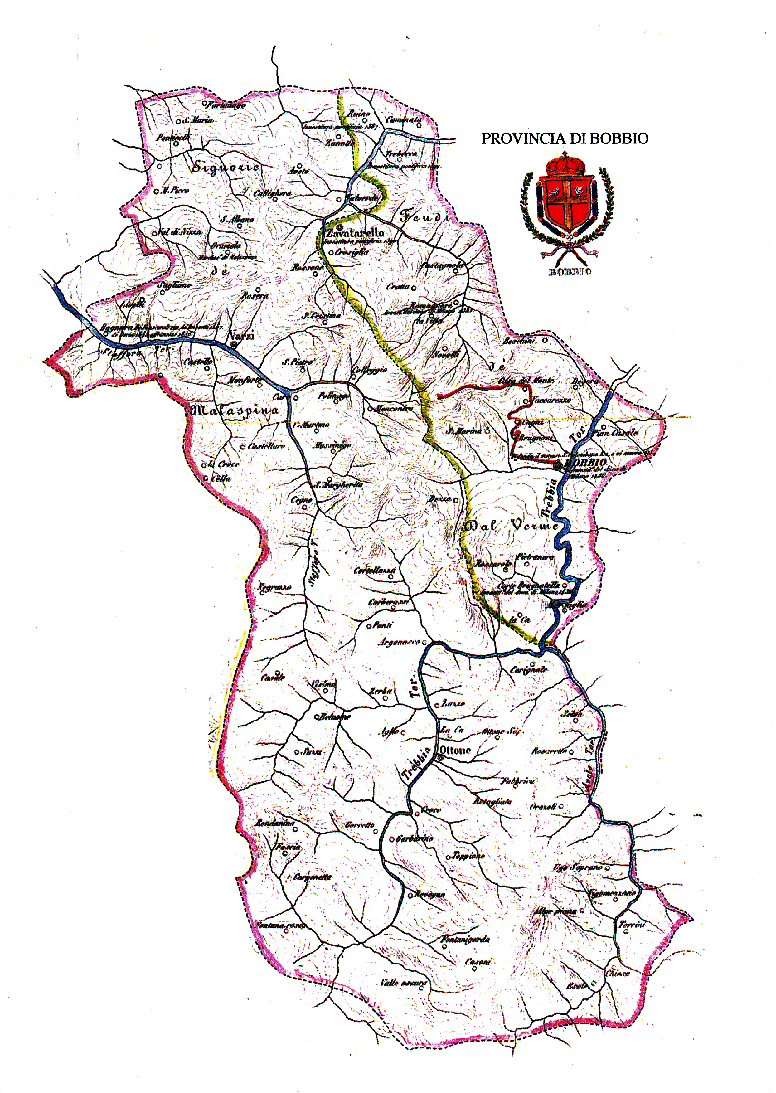 Mappa della Provincia di Bobbio (1743-1861)